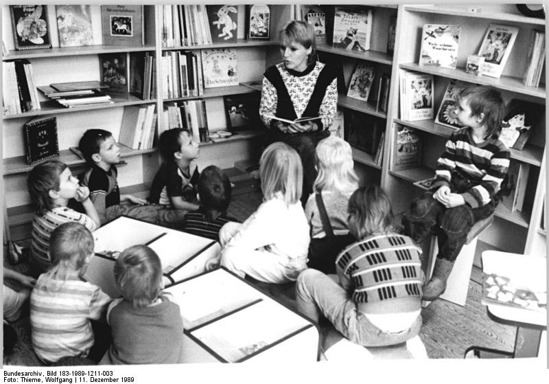 Chemnitz, Kinderbibliothek, Vorlesen ADN-ZB Thieme 11.12.89 Karl-Marx-Stadt: Märchenstunde in der Kinderbibliothek. Aufmerksam lauschen die Drei- bis Sechsjährigen der Leiterin der Einrichtung, Ines Hoppe. Sicher werden sich die Kinder jetzt und später auch gern Bücher ausleihen. Für drei Altersgruppen gesondert stehen für die Mädchen und Jungen 5 500 Bücher, Schallplatten und Kassetten bereit. Die Kinderbibliothek im Karl-Marx-Städter Rekonstruktionsgebiet Sonnenberg, die vor einigen Wochen geöffnet wurde, ist die erste im Bezirk.